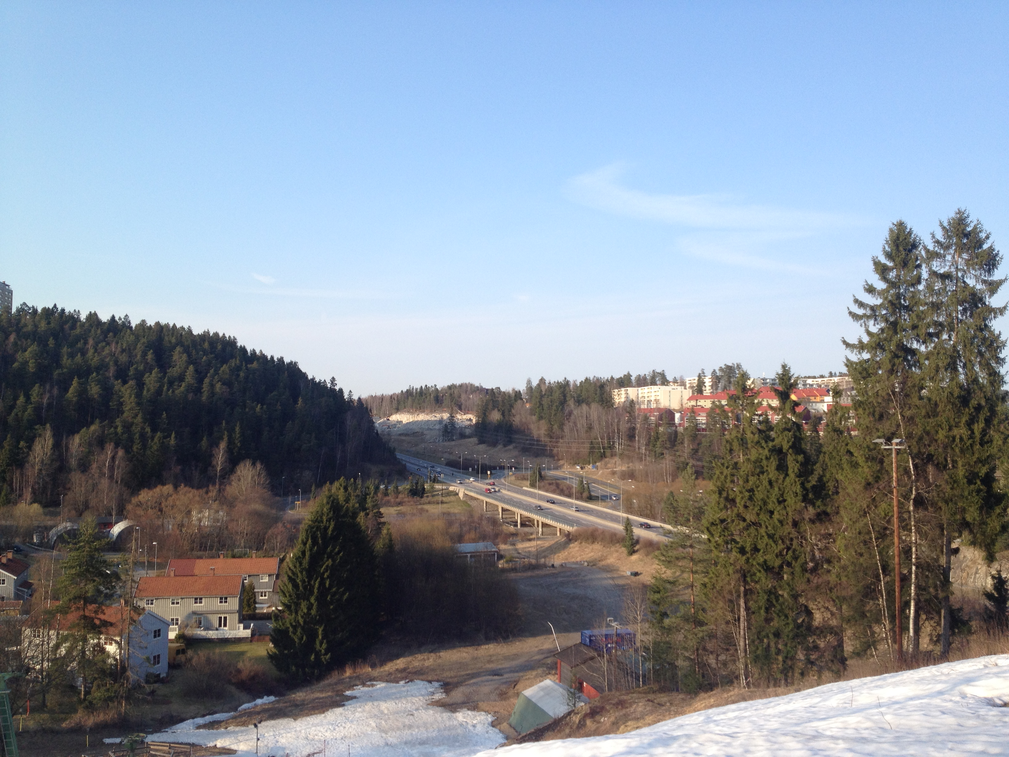 Skulleruddumpa i Oslo.